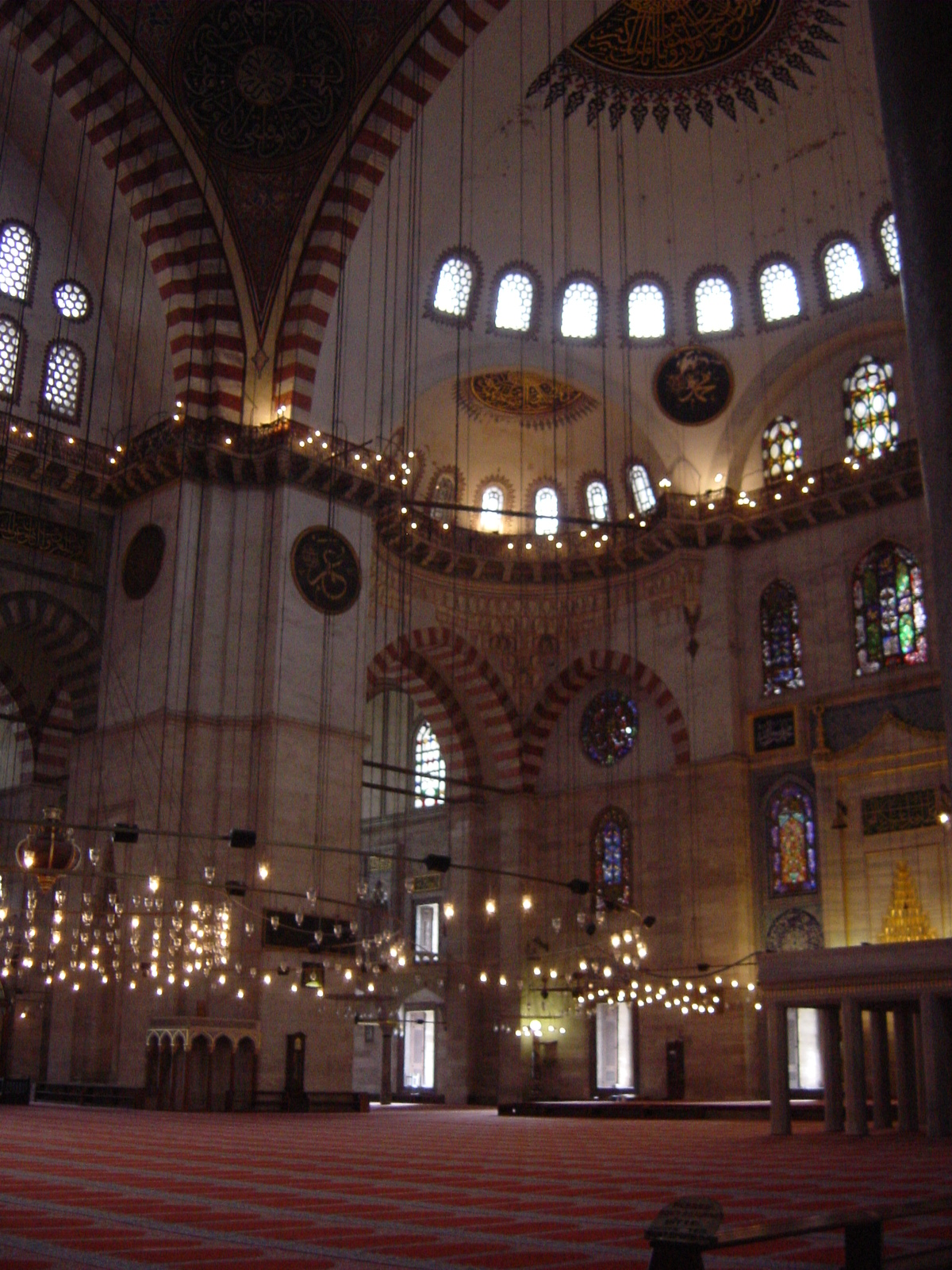 L'interno della Moschea di Solimano il Magnifico ad Istanbul. Foto di: Giovanni Dall'Orto, 26-5-2006.